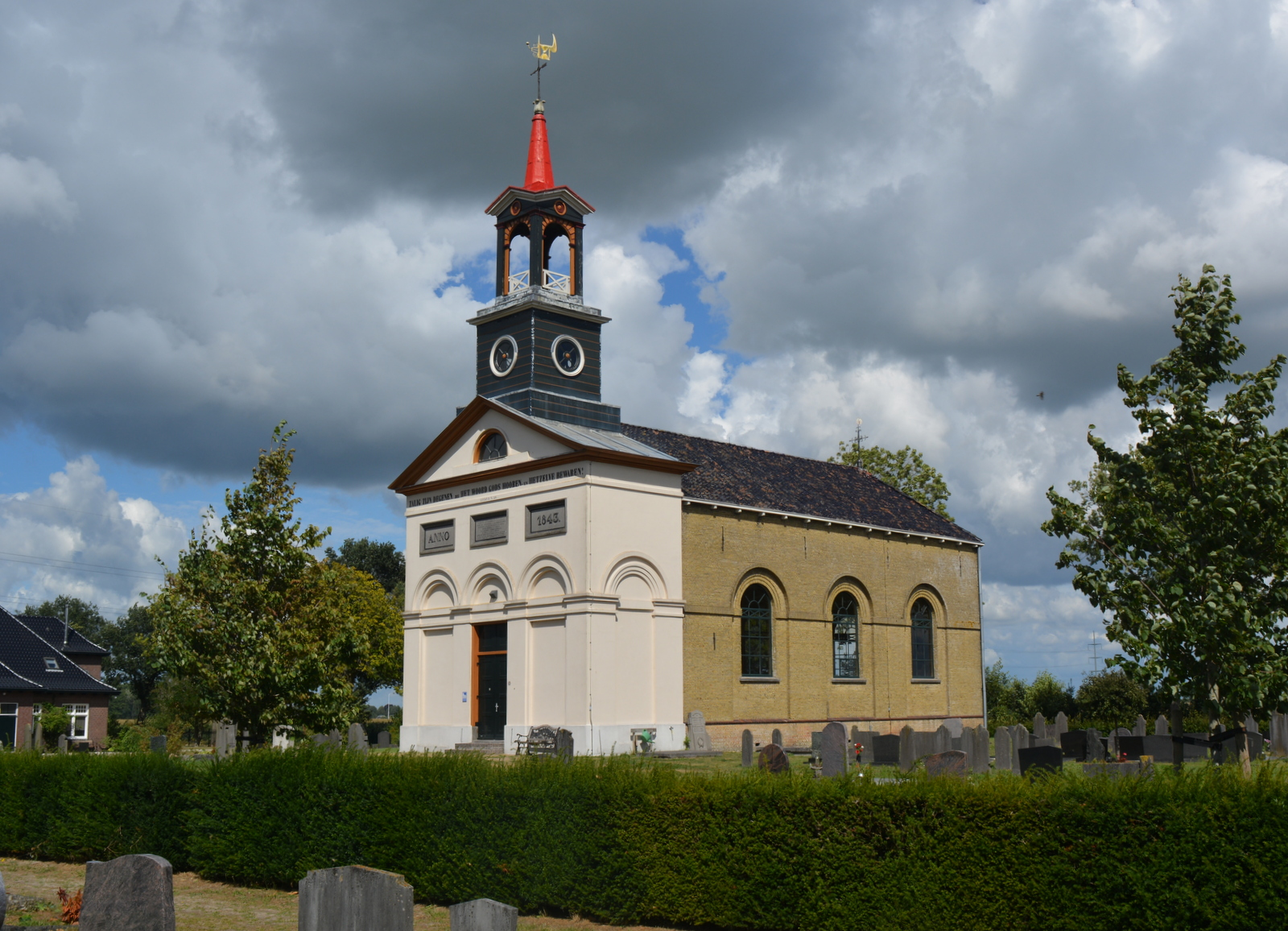 Terbantstertsjerke (foarhinne Rotondetsjerke)